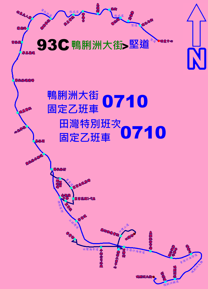 中文（香港）: 城巴93C線的走線圖，當中深藍線表示本線田灣開(經華貴、置富)的堍!班次才會駛經的